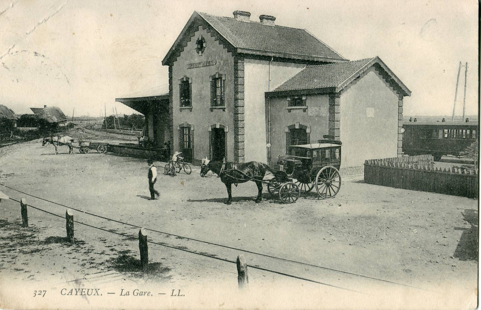 Carte postale ancienne éditée par LL N° 327 Cayeux-sur-Mer : La Gare (du Chemin de fer départemental de la Somme)